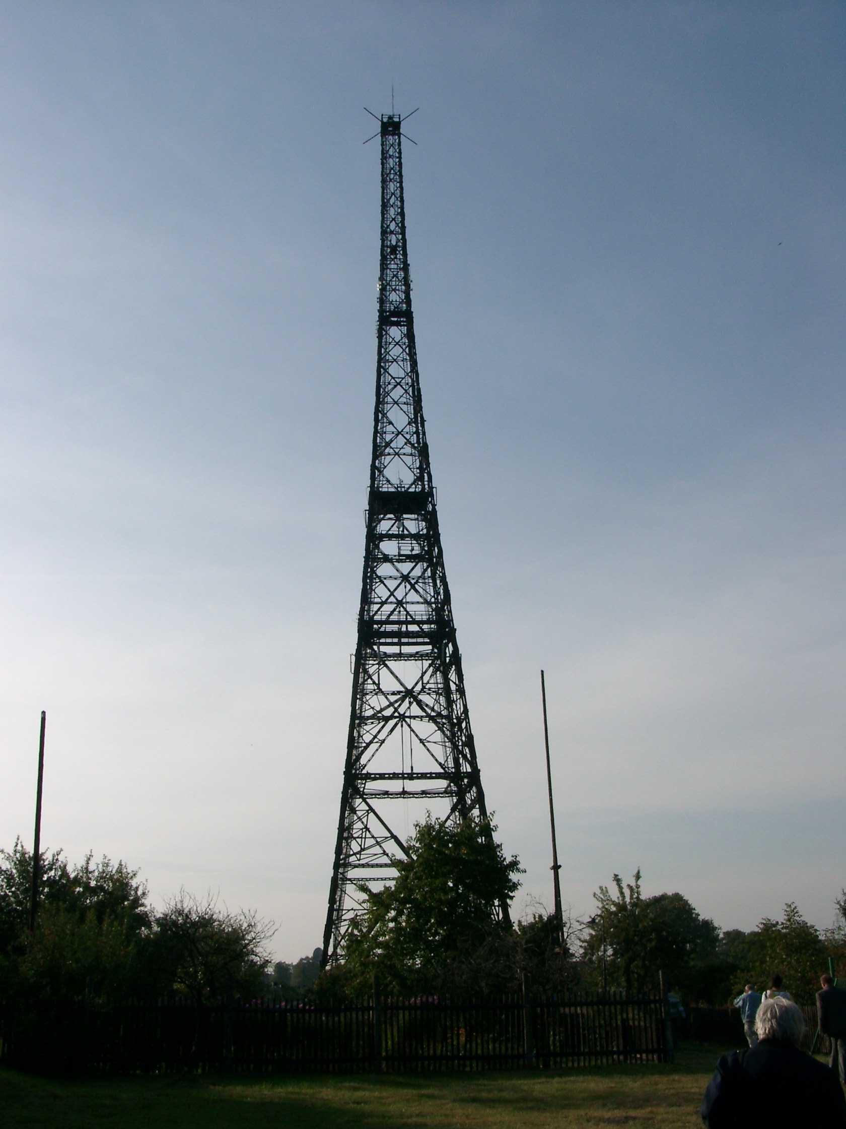 Sendeturm Gleiwitz.